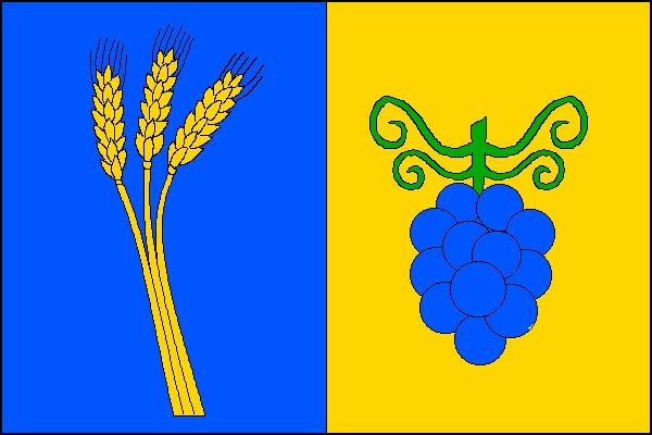 Vlajka obce Odrovice